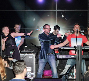 Группа «Дискотека Авария» на презентации нового клипа «К.У.К.Л.А.» 26 февряля 2013 года